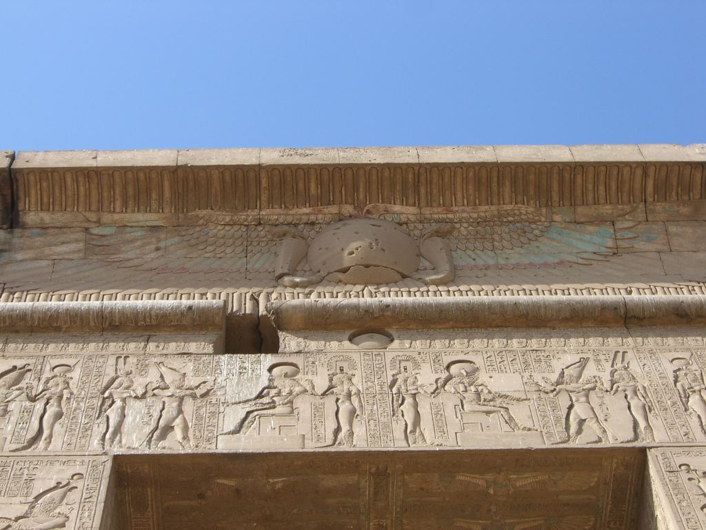 Détail du linteau de la face nord de la grande porte d'accès du temple de Khonsou à Karnak - Dynastie ptolémaïque